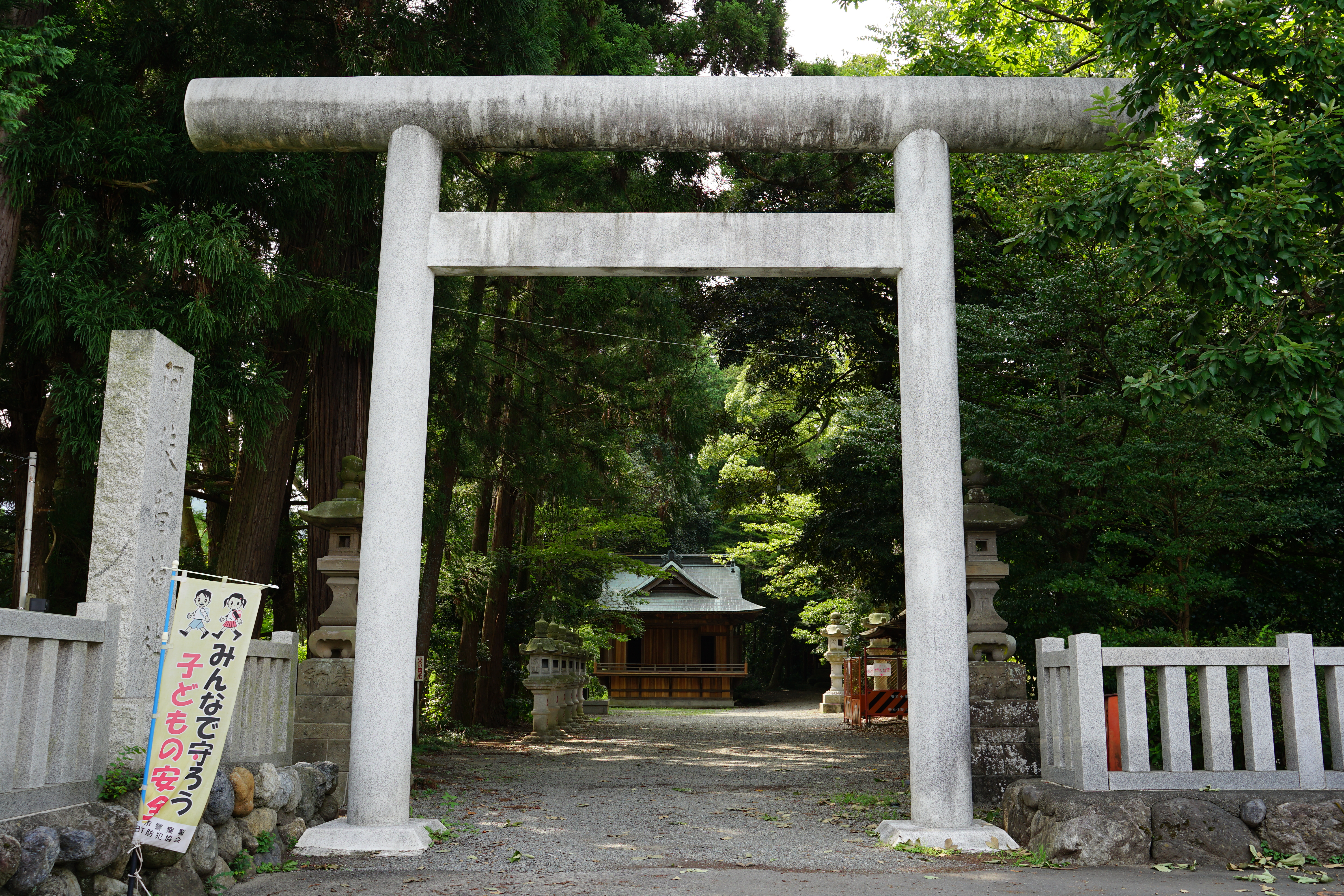 阿伎留神社の鳥居（東京都あきる野市）